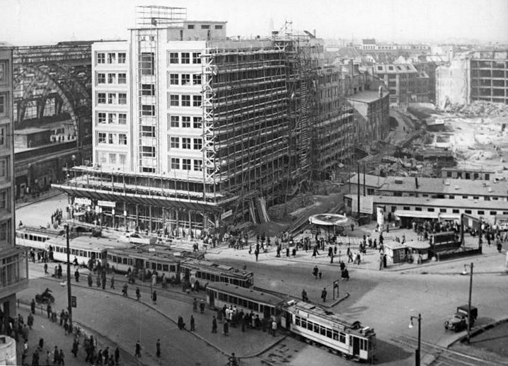 Berlin, Alexanderplatz, Baustelle, Straßenbahn, S-Bahnhof Illus 26.10.50 Berlin 1950. UBz: Blick vom Alexanderhochhaus auf das Berolinahaus am Alexanderplatz.